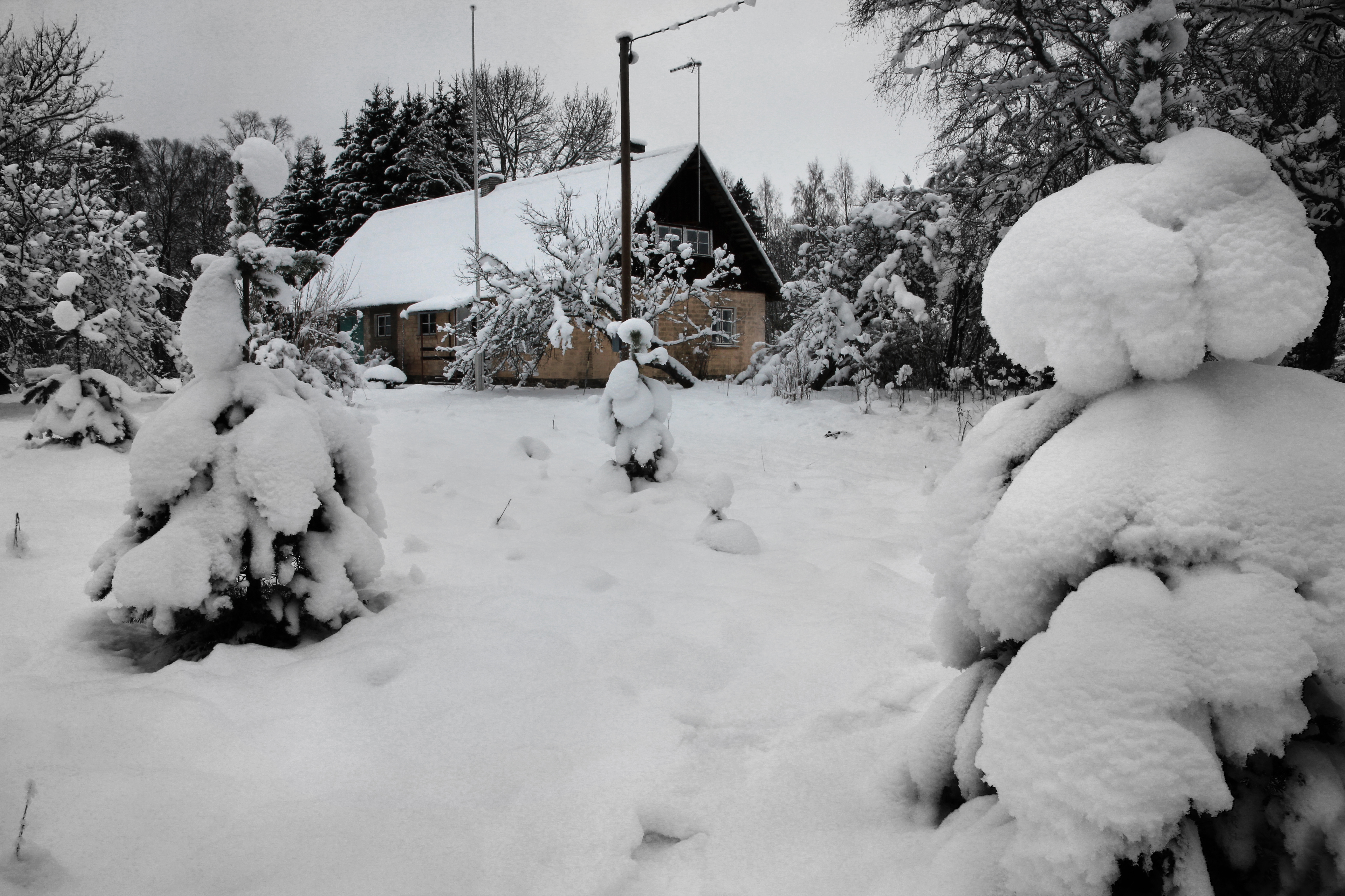 Pillapalu asundsustalu talvel